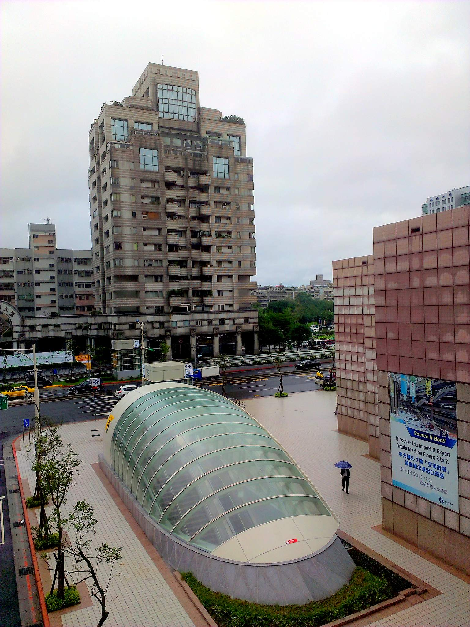 中文（台灣）: 由空中拍攝台北捷運台北101/世貿站五號出口。